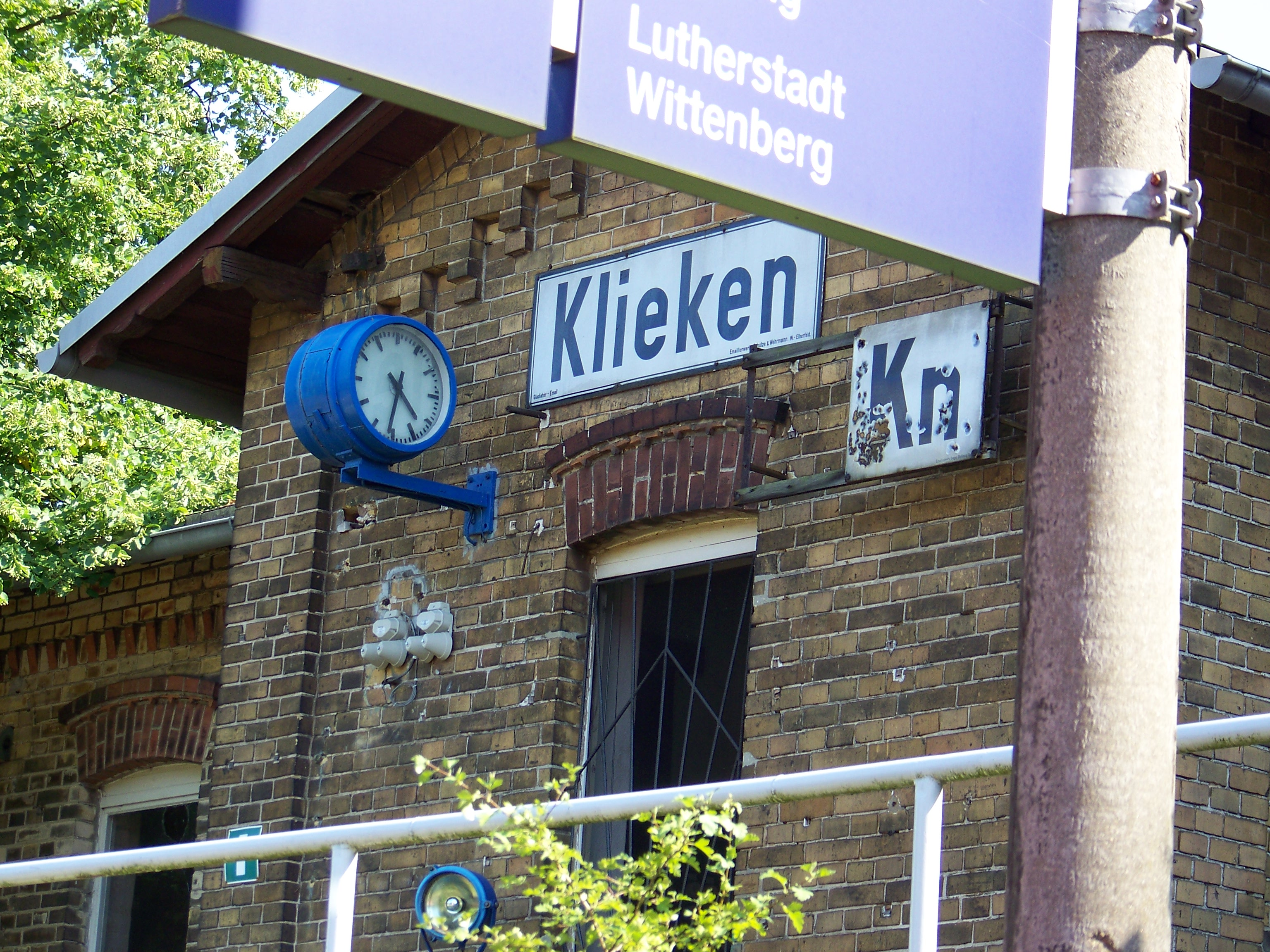 Bahnhof Klieken an der Bahnstrecke Dessau–Falkenberg/Elster in Sachsen-Anhalt. Der Bahnhof war zum Zeitpunkt der Aufnahme noch von einer Mitarbeiterin der DB besetzt (offenes Fenster), die die Schrankenanlage bedient.